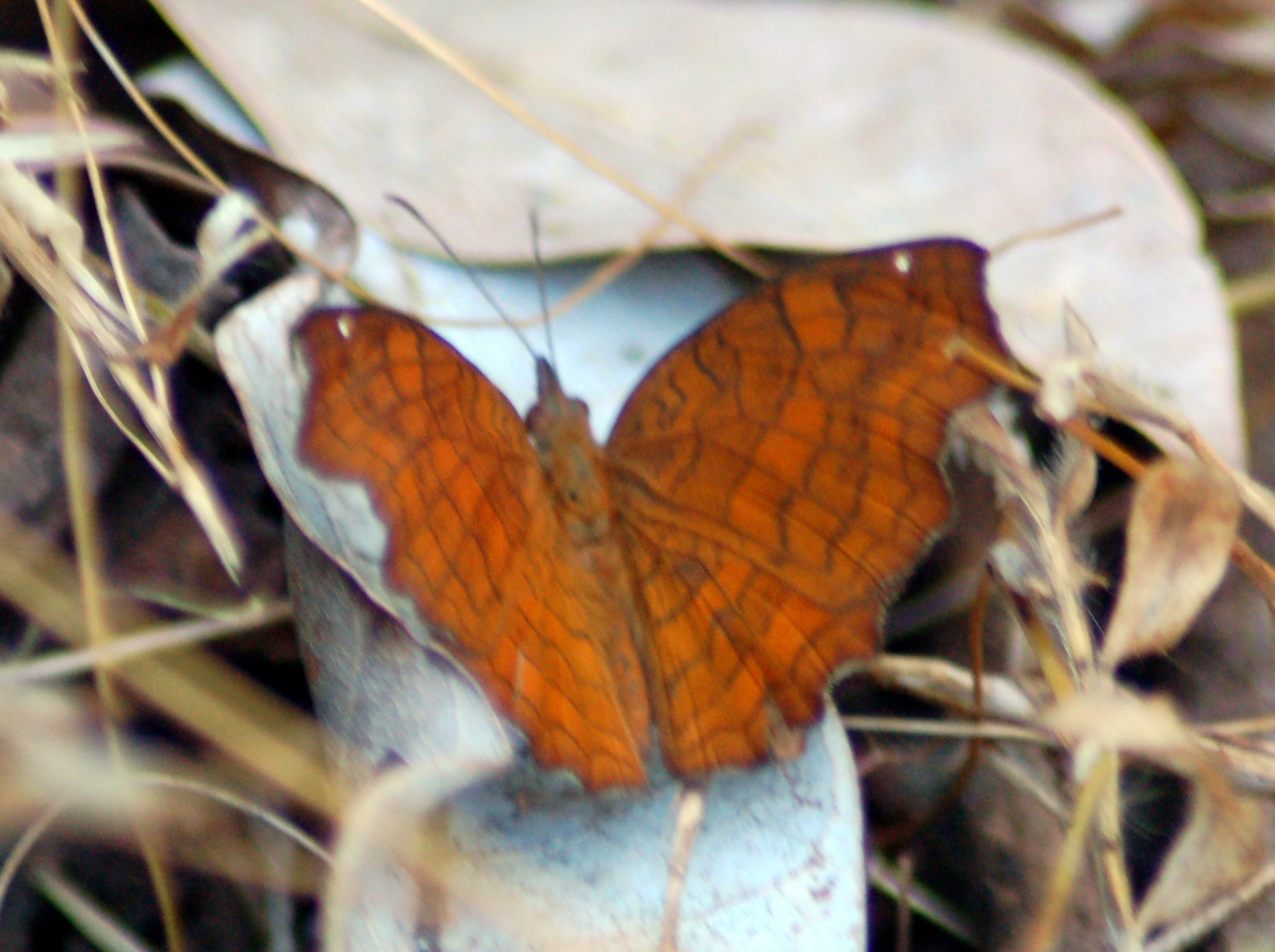 Angled Castor : Ariadne ariadne